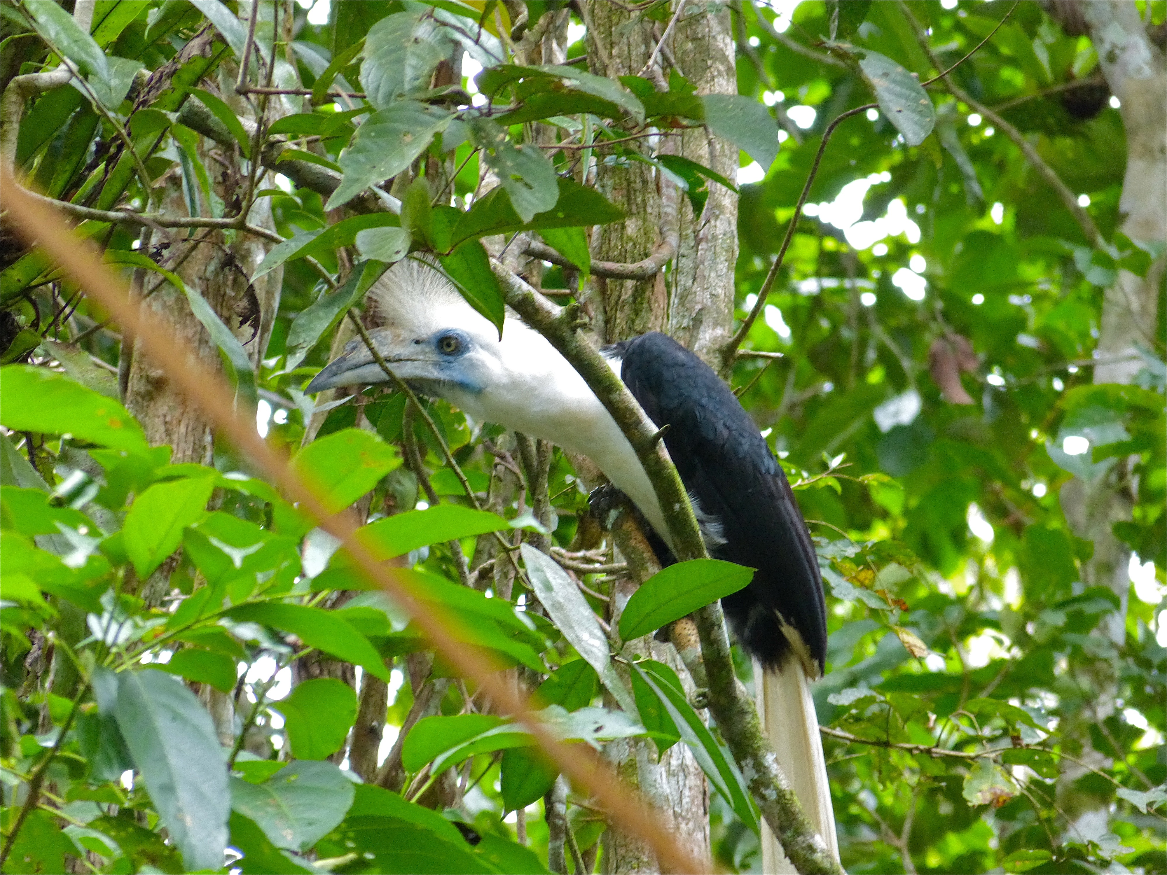 Uncle Tan's Jungle Camp, Kinabatangan River, Sabah, MALAYSIA